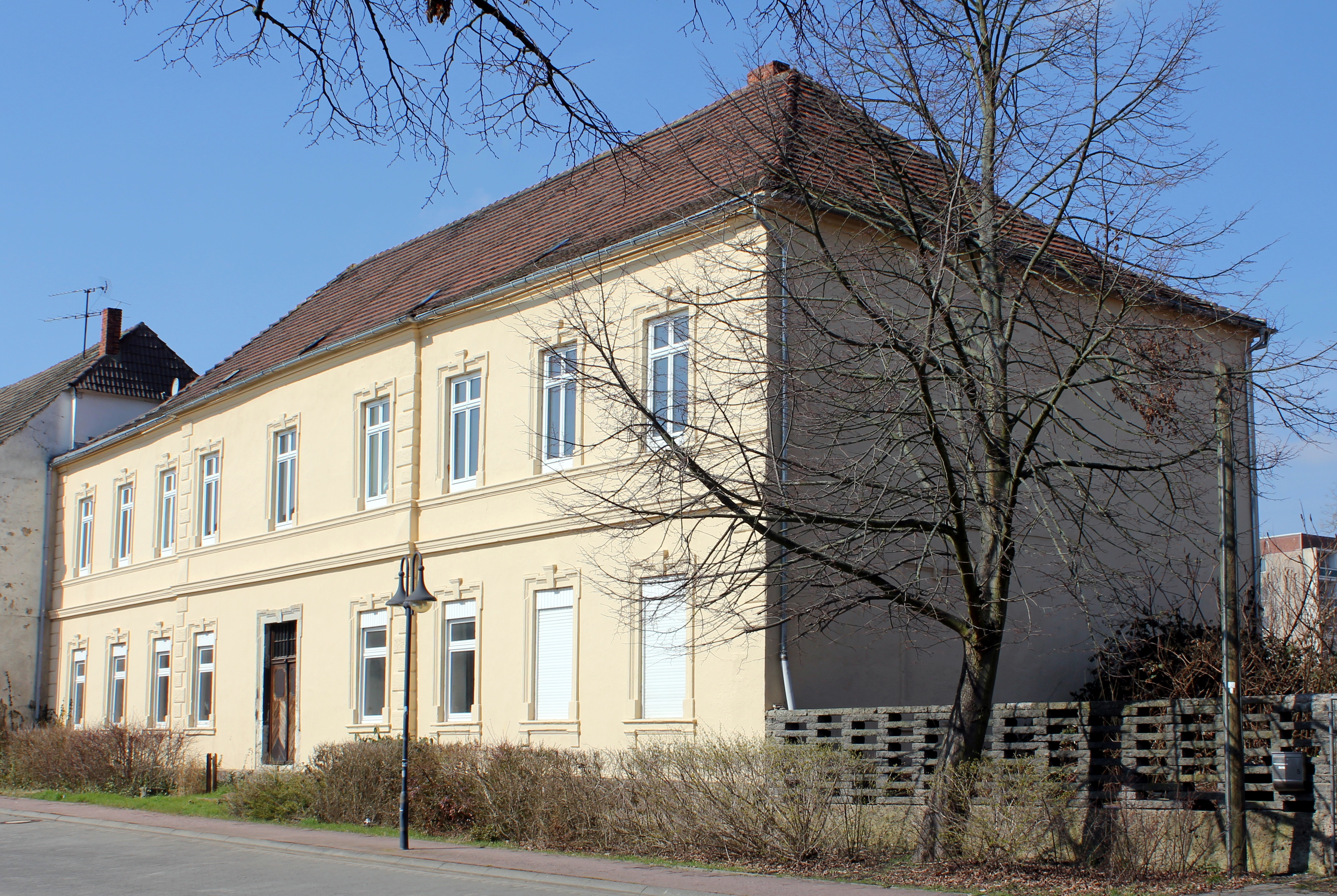 Herrenhaus, Burgstraße 5, Wolmirstedt